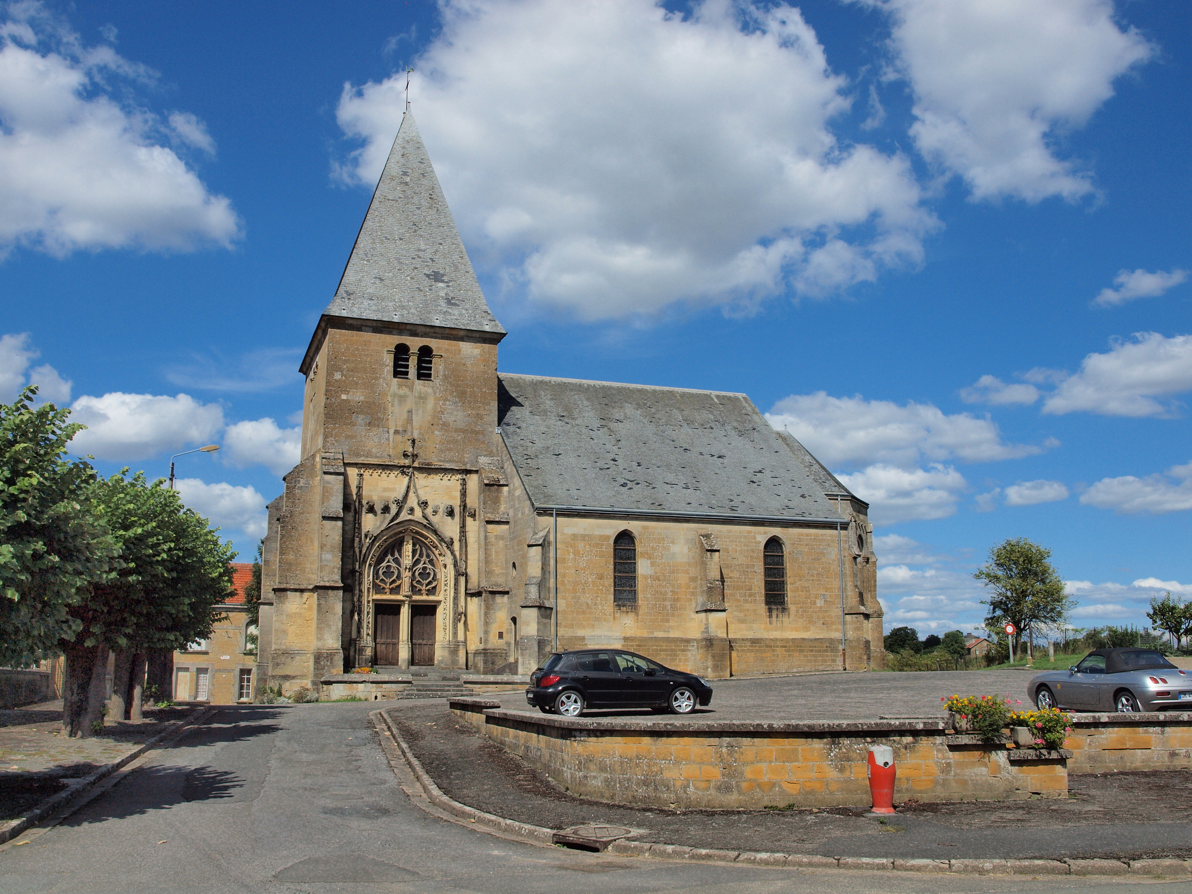 Église Notre-Dame de Voncq (Ardennes, France)